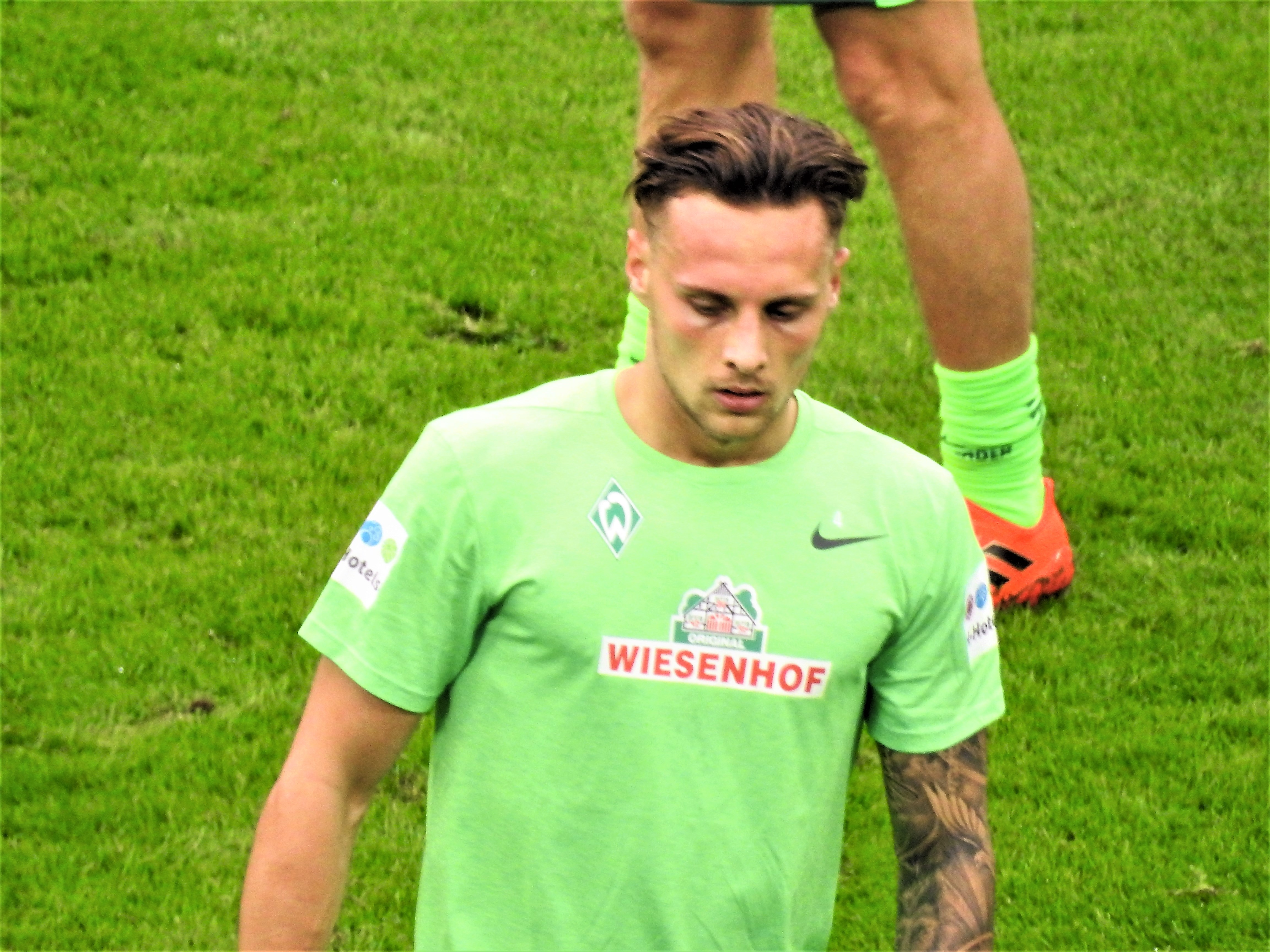 Robert Bauer als Spieler von Werder Bremen